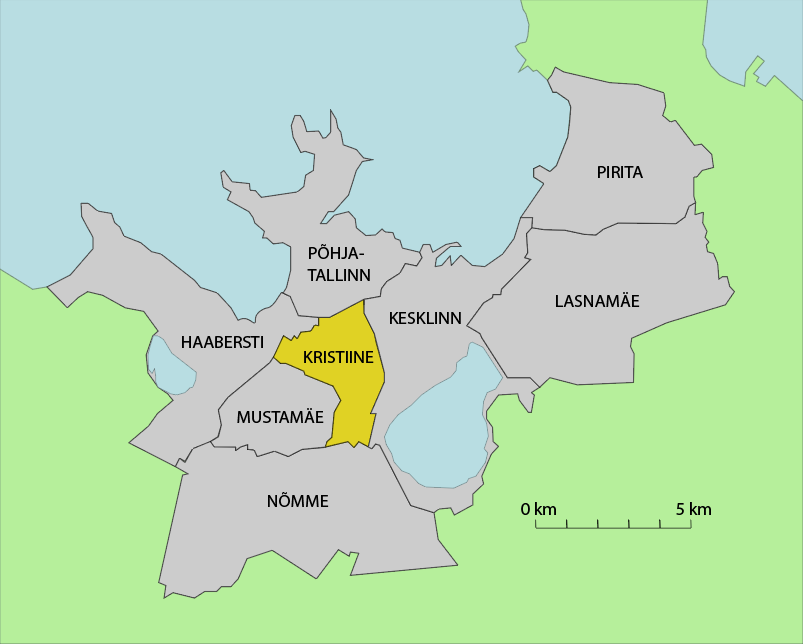 Kaart Kristiine linnaosa paiknemisest Tallinnas.